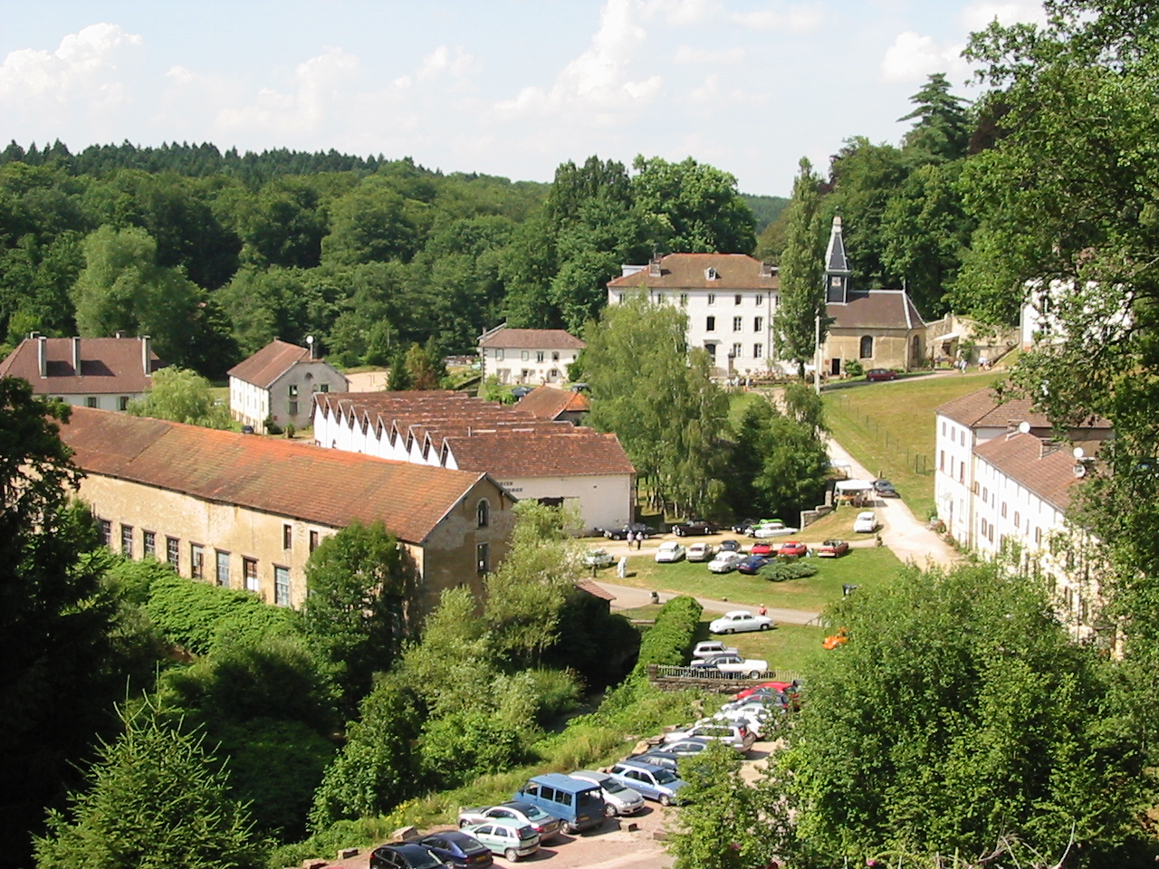 Manufacture Royale de Bains-les-Bains, dans les Vosges. Vue d'ensemble des bâtiments. Object location 47° 59′ 49.46″ N, 6° 13′ 59.97″ E This and other images at their locations on: Google Maps - Google Earth - OpenStreetMap - Proximityrama(Info)